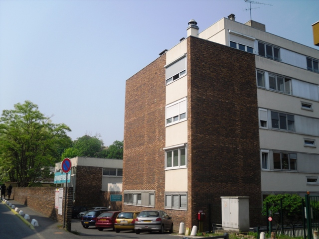 La clinique Pasteur de Ris-Orangis (91)